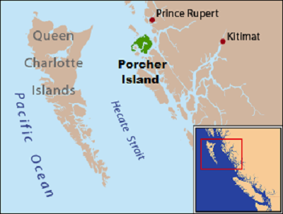 Kanada, Porcher Island